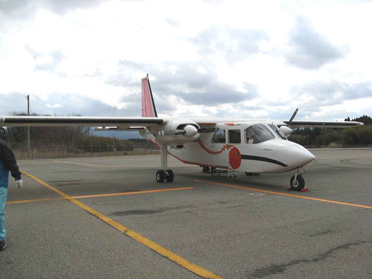 旭伸航空 ブリテン・ノーマン アイランダー 新潟～佐渡便。佐渡空港にて